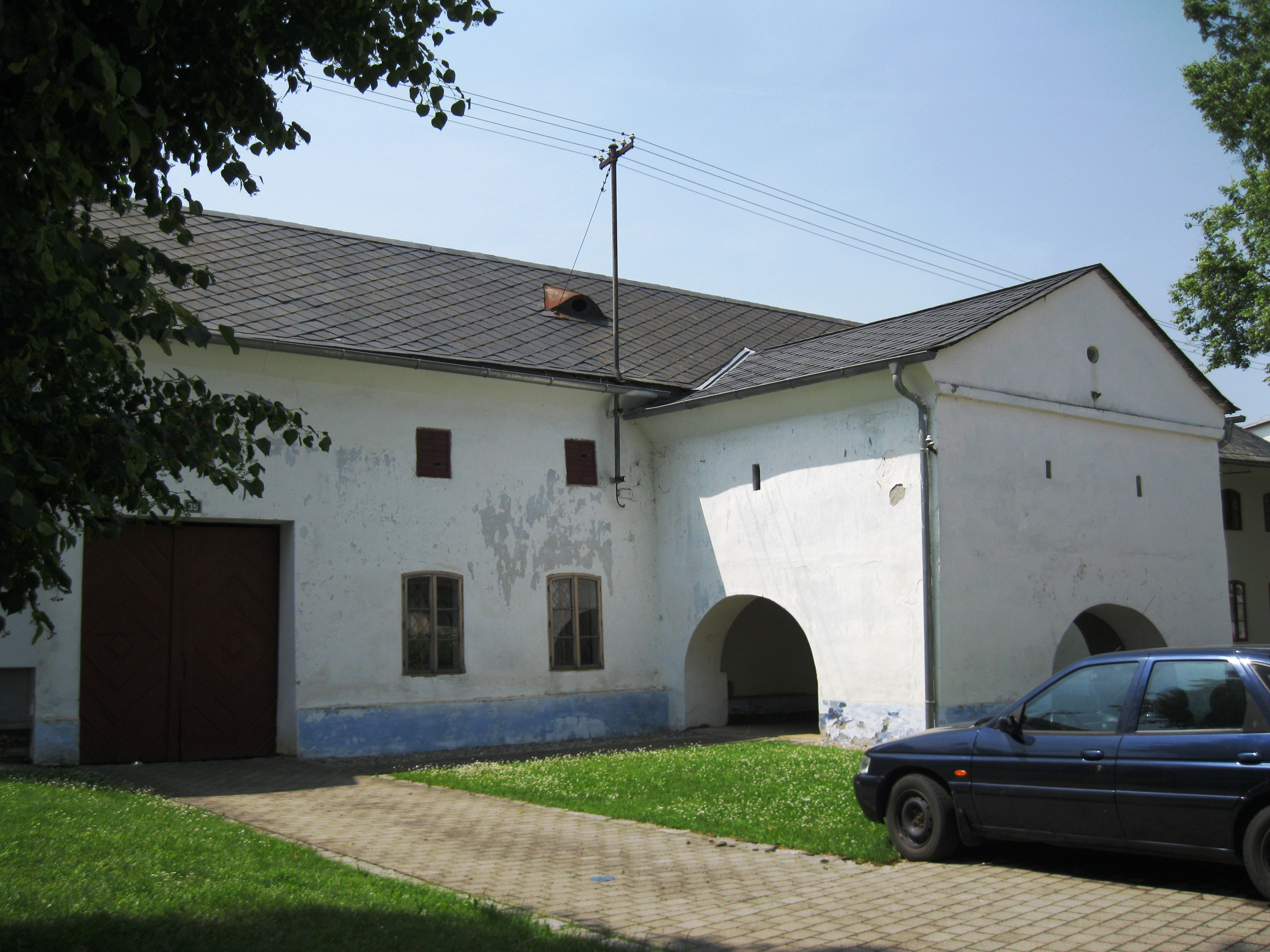 Venkovská usedlost (Bílovice), Bílovice 35